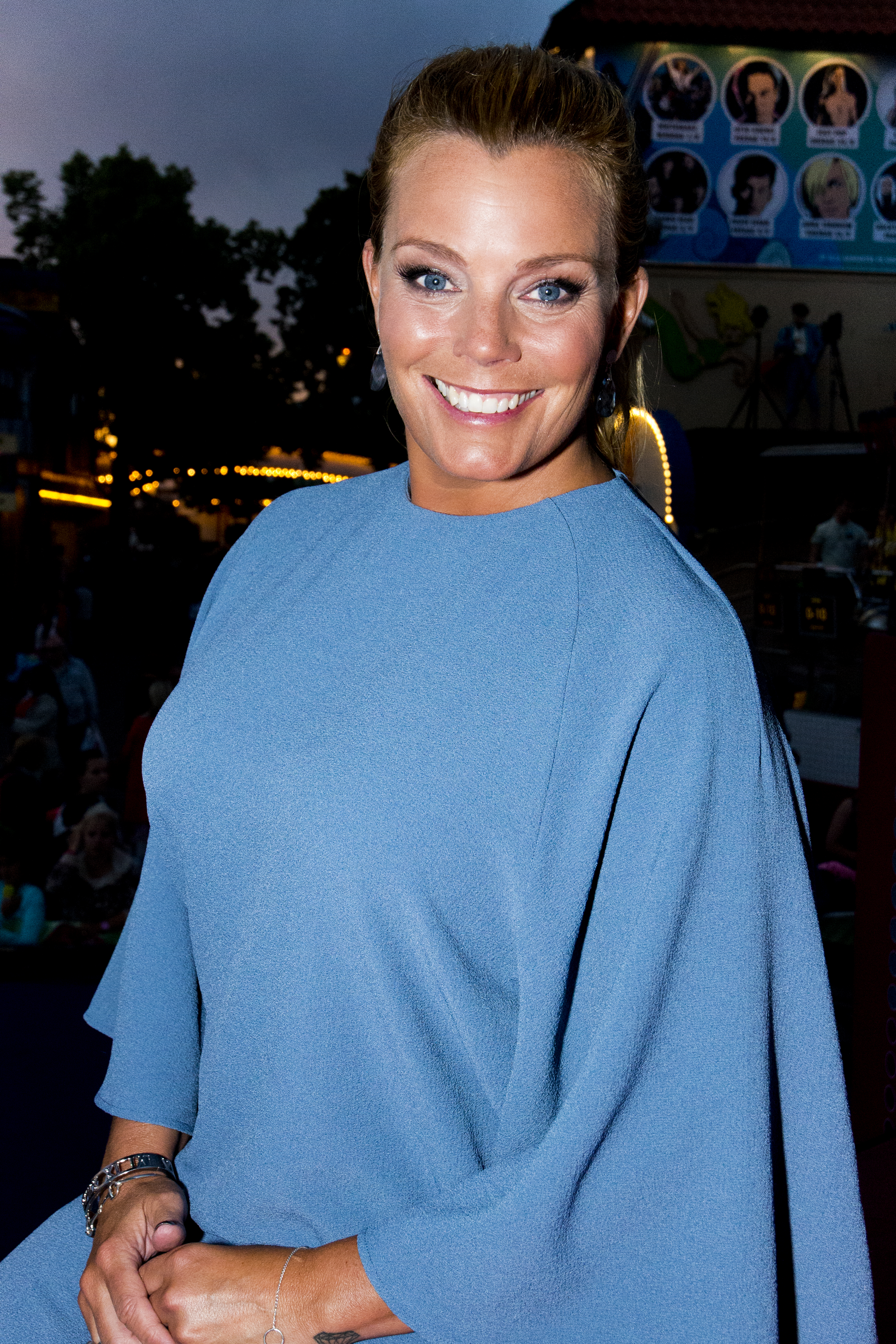 Gry Forssell programledare för Sommarkrysset, här efter programmets slut